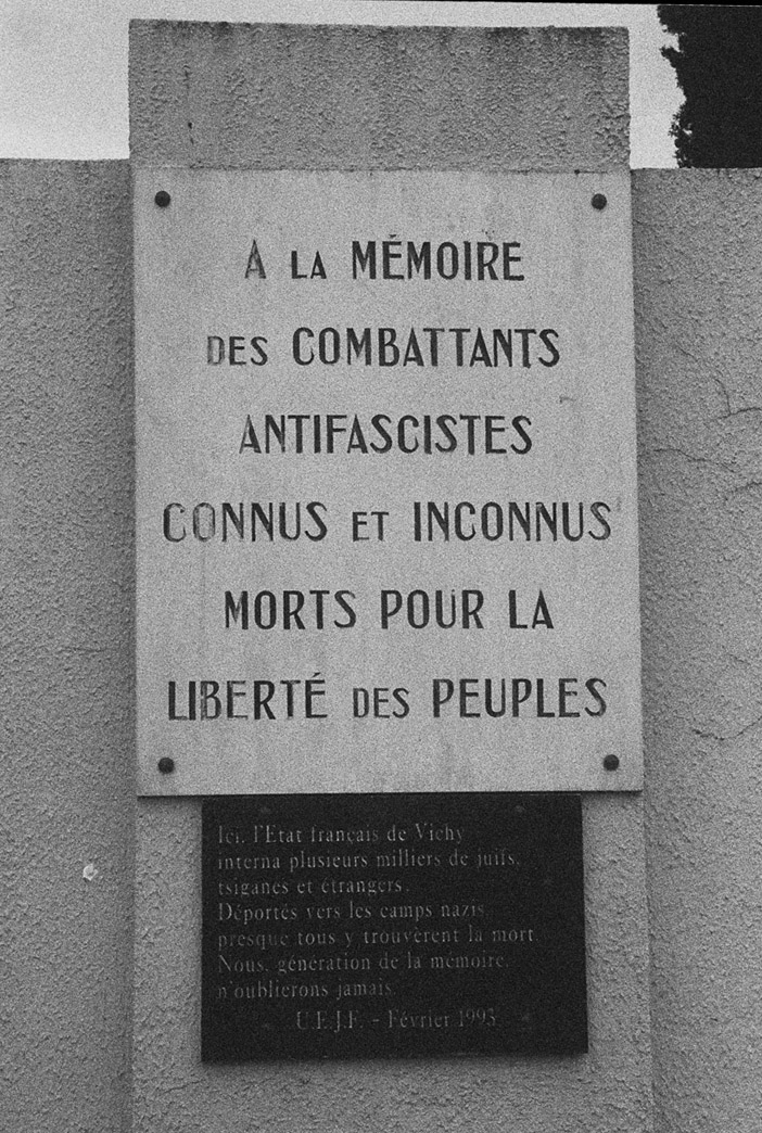 camp internament Vernet d'Ariège